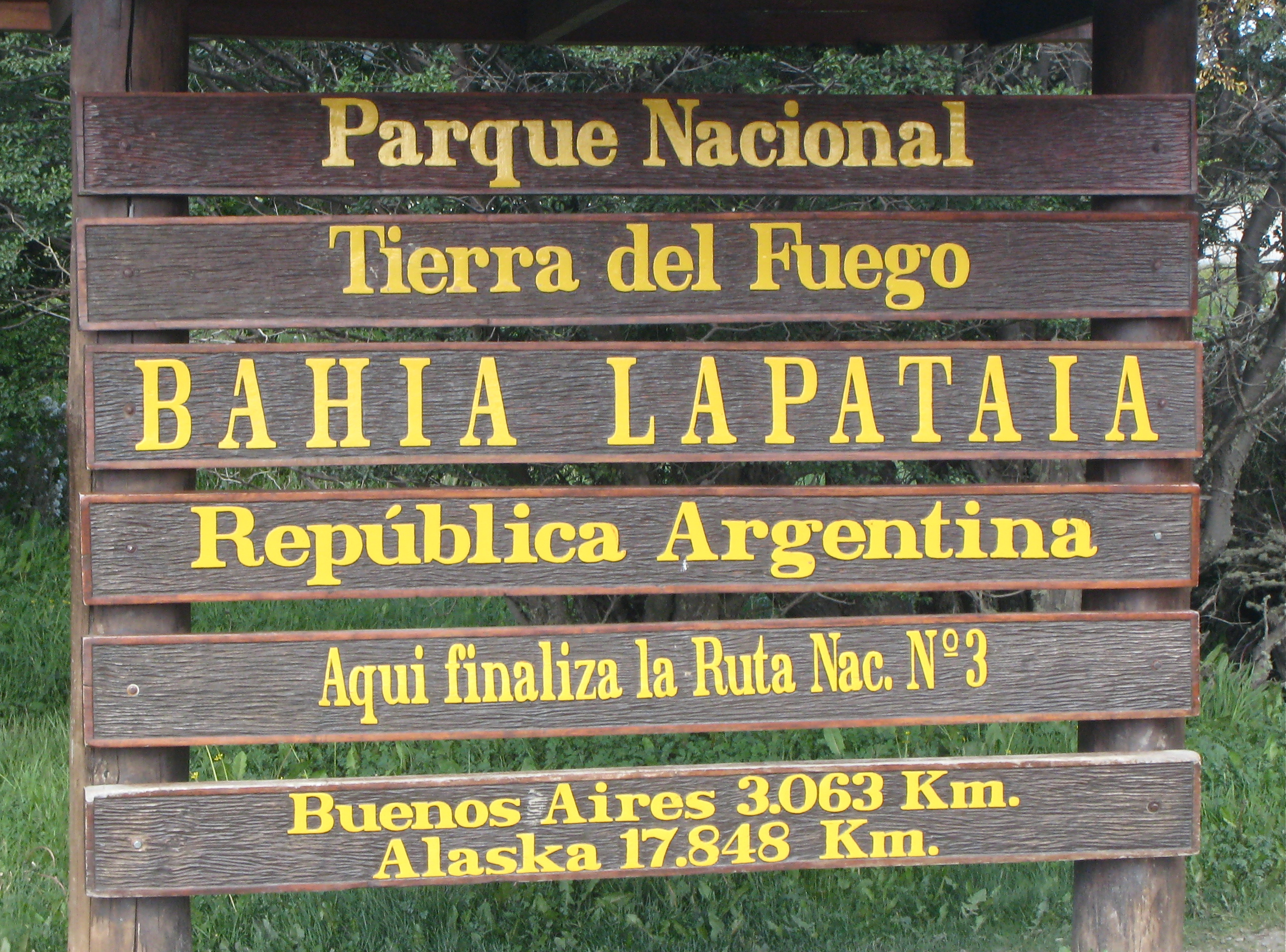 Indicación del Parque Nacional Tierra del Fuego (Argentina) en la bahía Lapataia. Fin de la Ruta Nacional Nº 3.